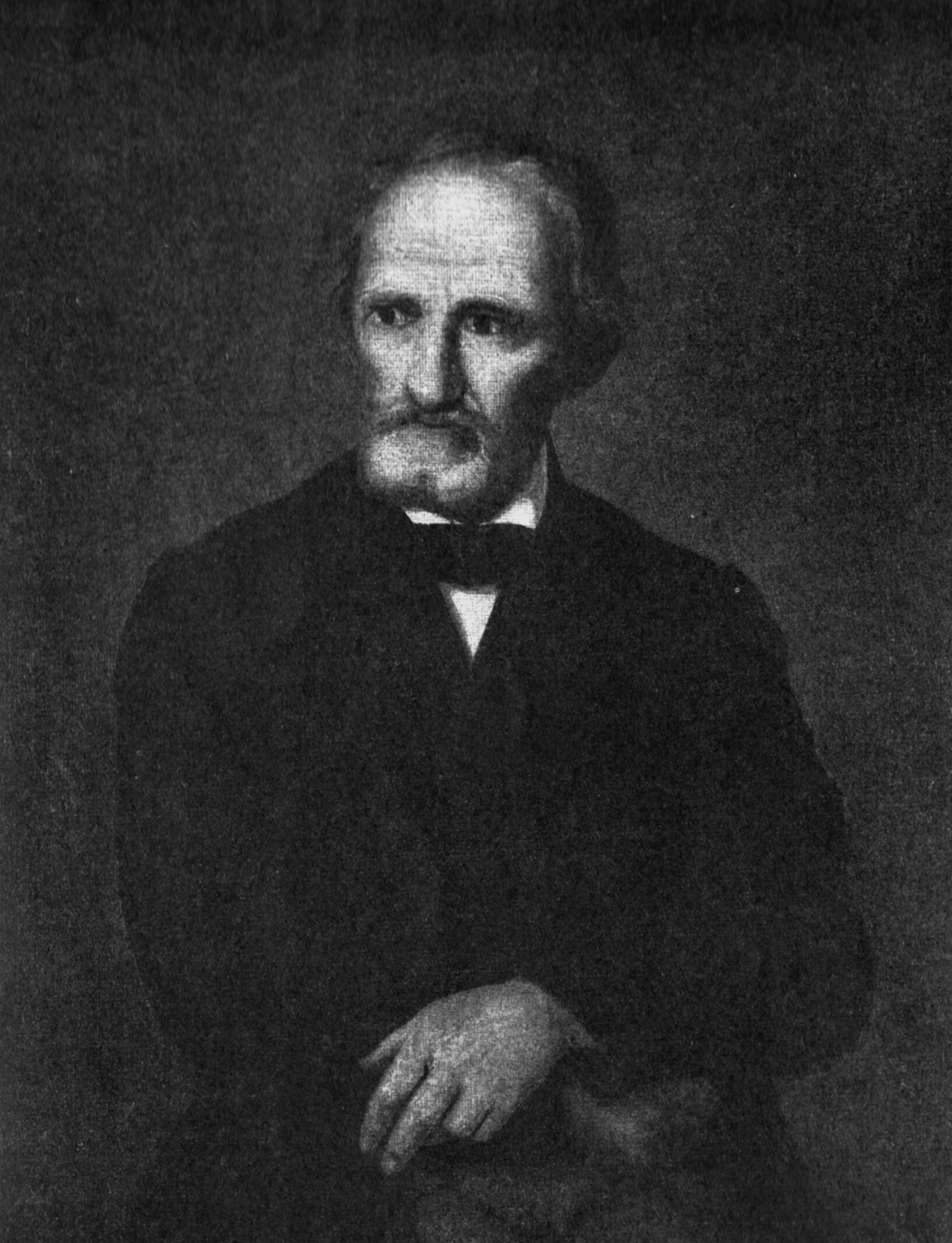 Johann Baptist Kirner, Porträtiert von J. Laule